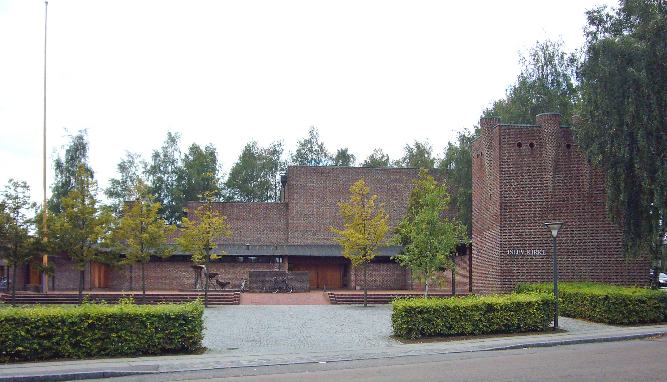 Islev Kirke, Rødovre, Denmark. Islev Kirke